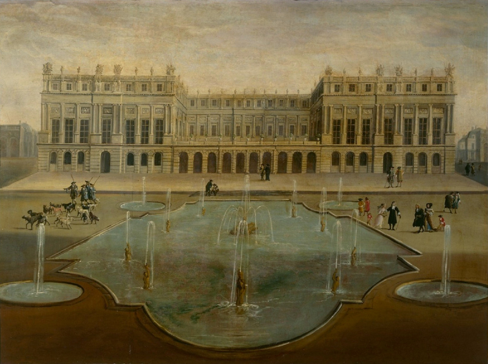 Ansicht des Schlosses Versailles um 1675, vor dem Bau der Spiegelgalerie